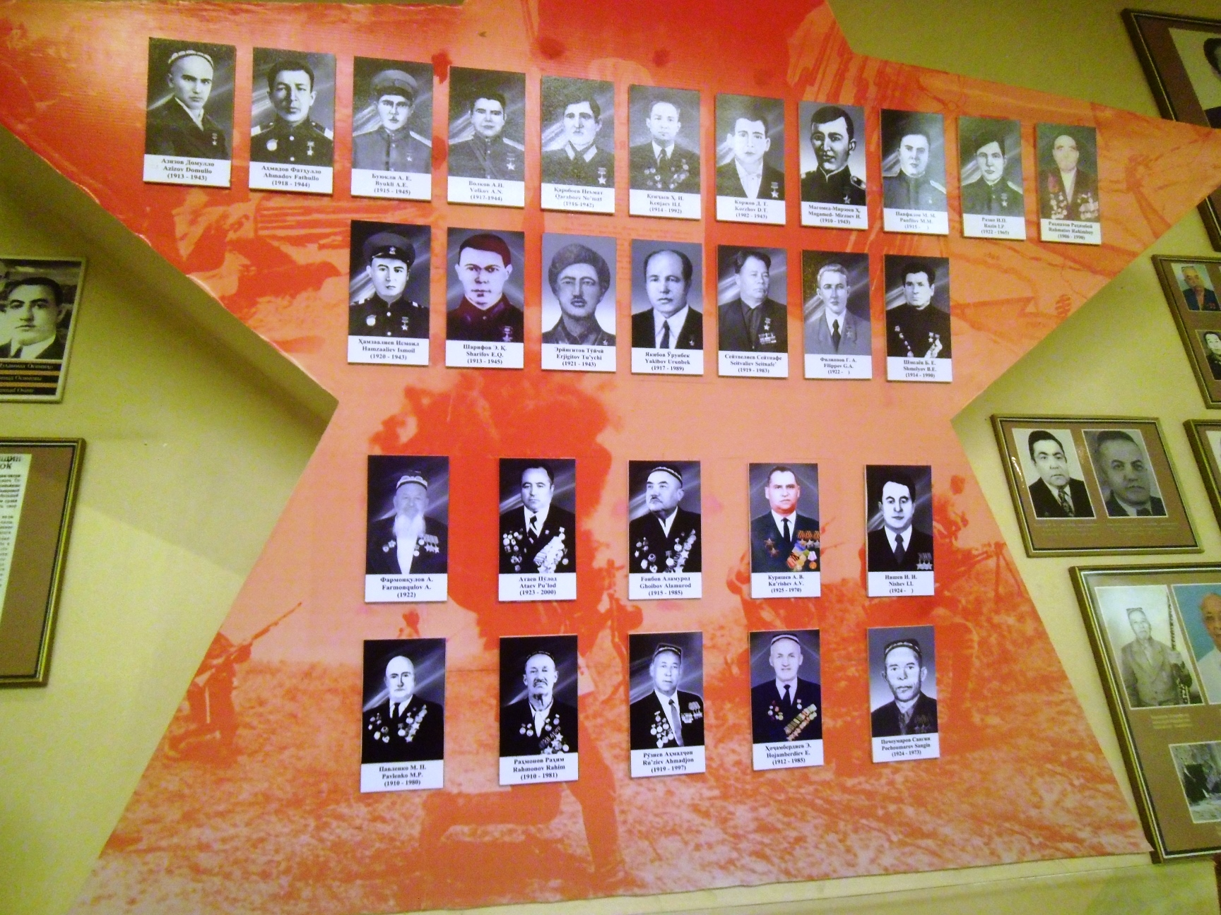 Музейные экспонаты в Согдийской области Тоҷикӣ: Экспонатҳои осорхонаҳои вилояти Суғд